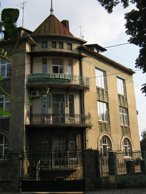 Житловий будинок у Львові (вул. С.Котляревського, 25). архітектор Іван Левинський (1909)